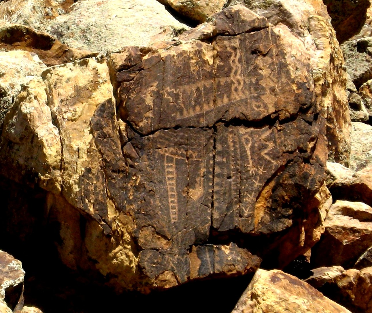 Parowan Gap petroglyphs, Utah